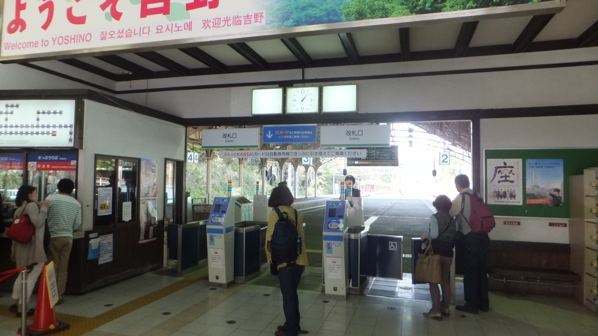 吉野駅（2014年4月19日）